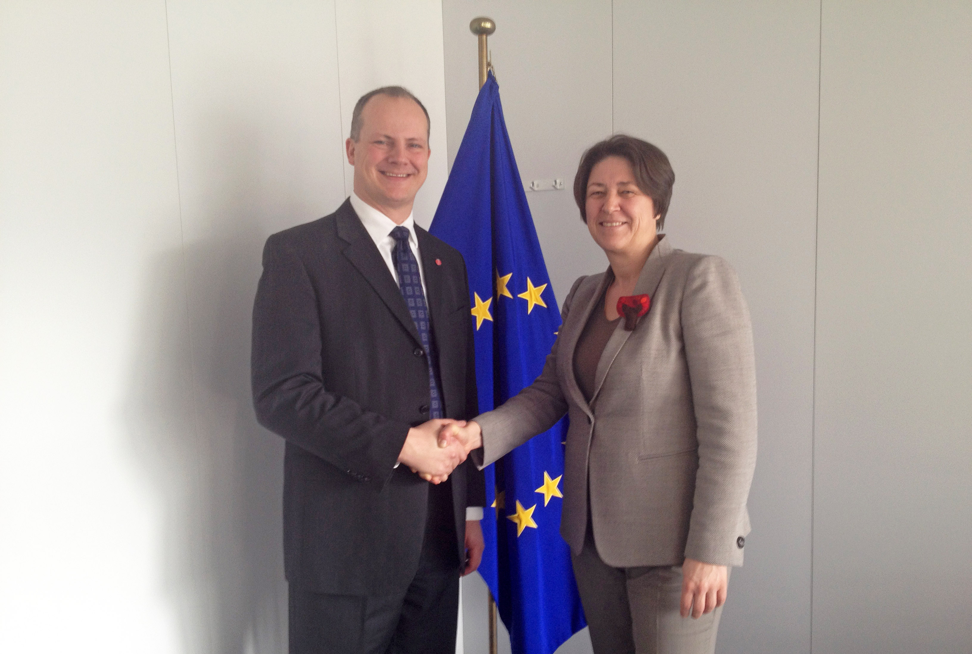 Samferdselsminister Ketil Solvik-Olsen med EUs samferdselskommissær Violeta Bulc. På møteplanen sto blant annet jernbane, vegtransport, luftfart og norsk elbilpolitikk. Foto: Stian Mathisen, EU-delegasjonen